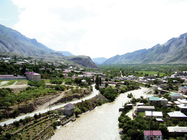 аул Гергебиль Республика Дагестан